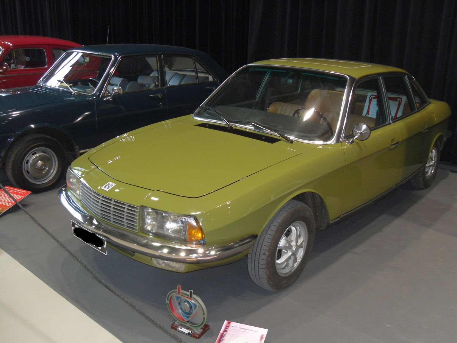 NSU Ro80